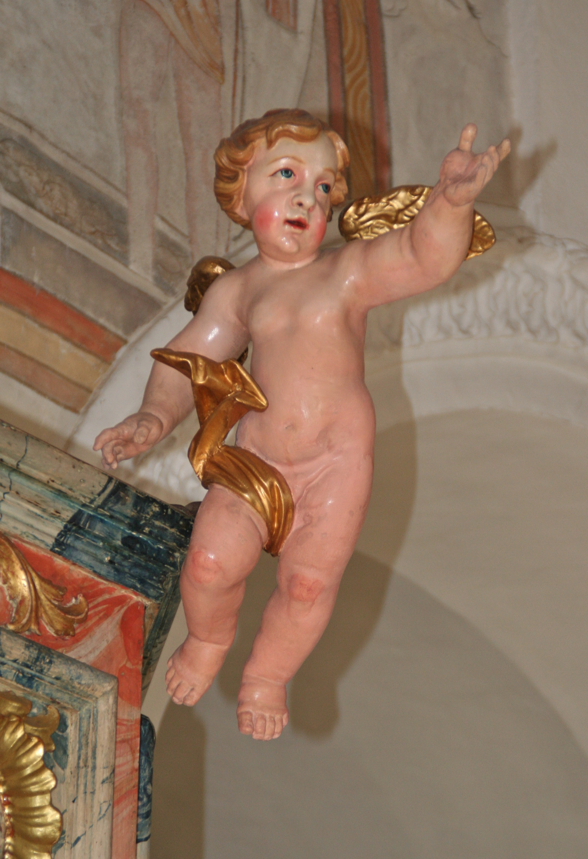 Kirche St. Stephan (Cumbel) Engel an der Kanzel